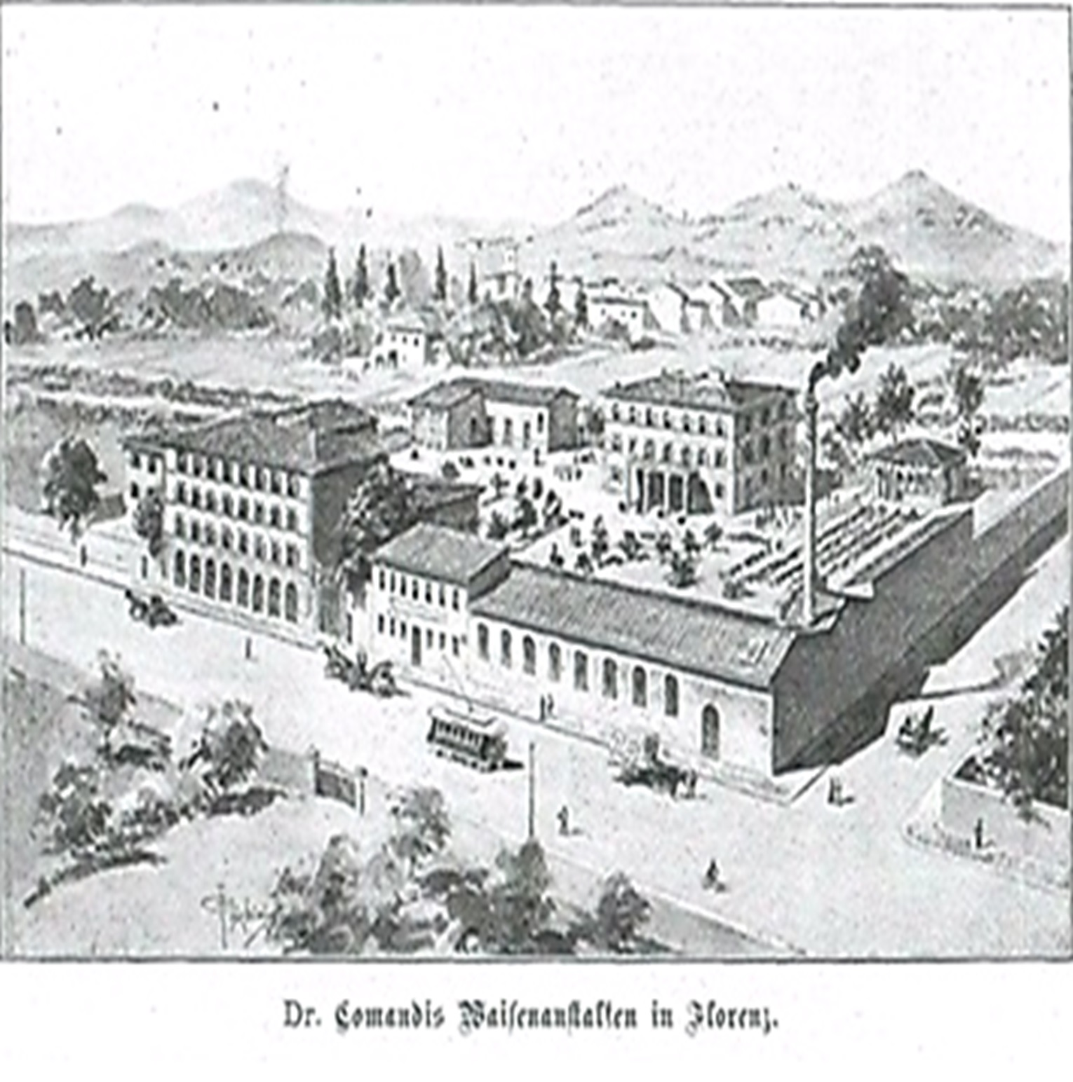 Dr. Comandis Waisenhaus auf einem Bild aus den Brosamen 1899